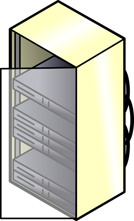 serveur rack